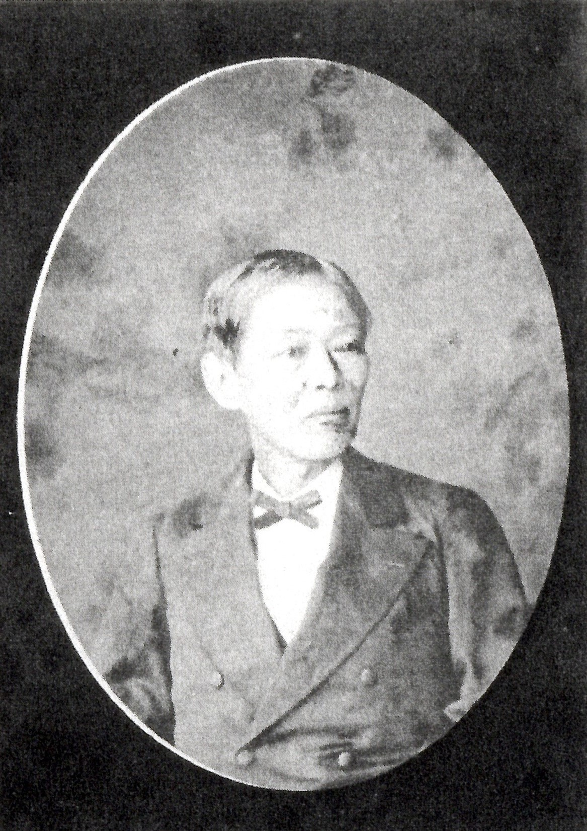 京極高厚の肖像写真。